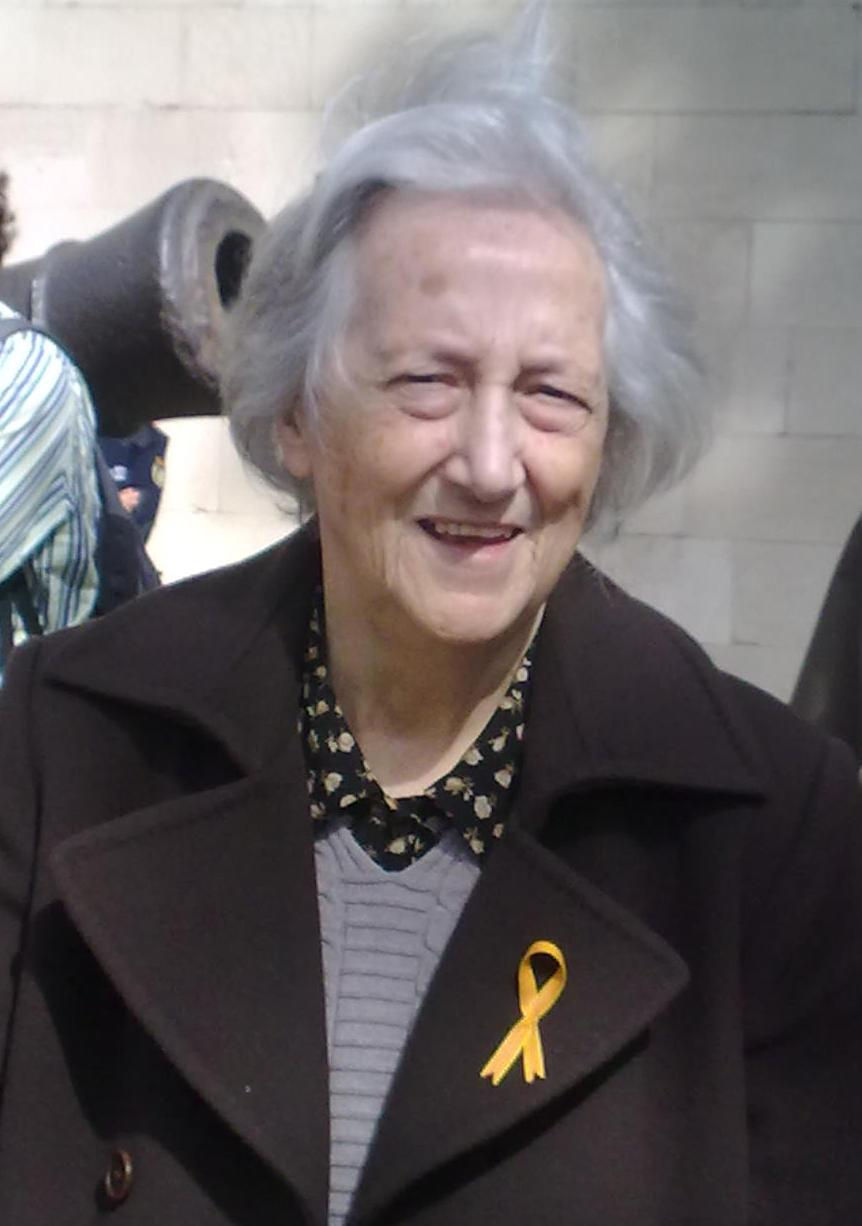 Aina Moll i Marquès. Manifestació "Enllaçats per la Llengua". 9 de març de 2013